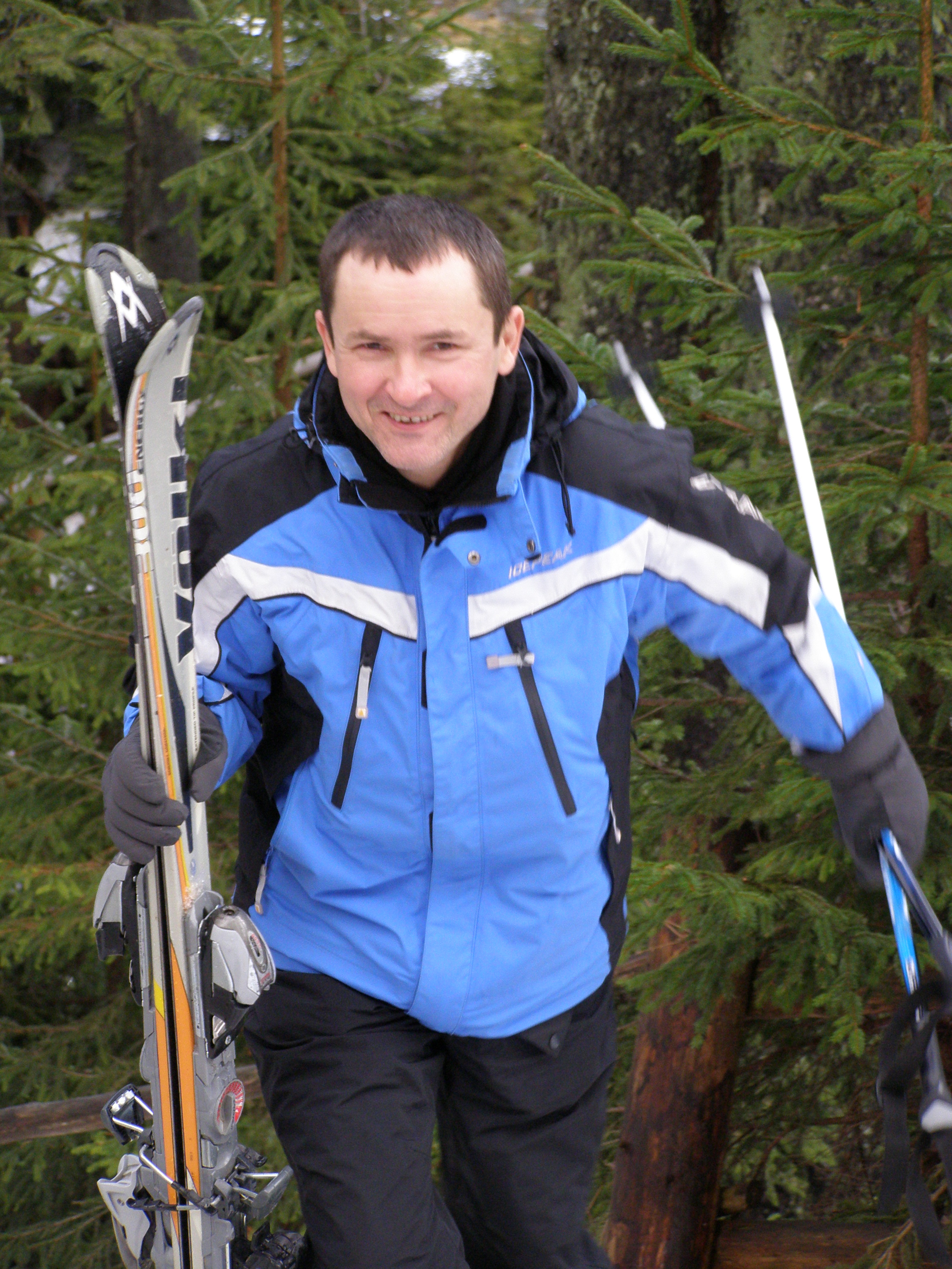 Well-known Ukrainian smith and knifemaker Petro Fedoriaka from Myrhorod district, Poltava region